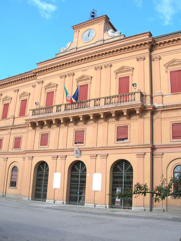 Delizia Estense di Copparo. La foto è stata scattata da Andrea Fortini.